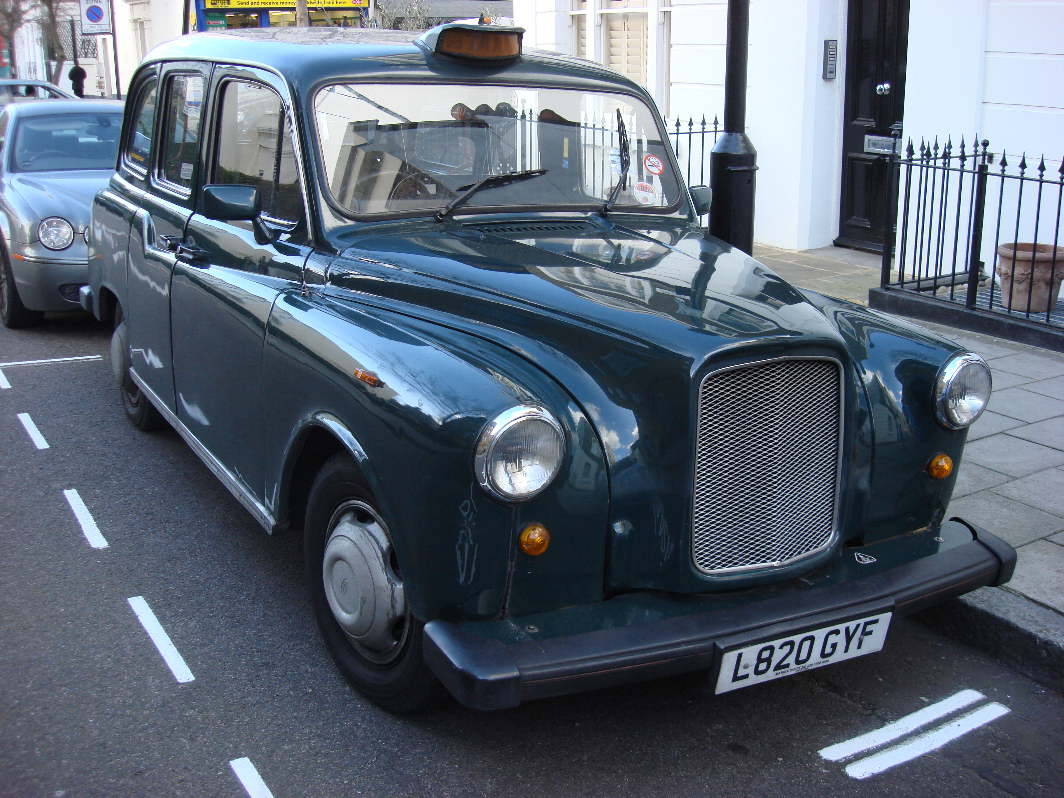 Dark Green London Taxi at Belgrave Gardens, London NW8